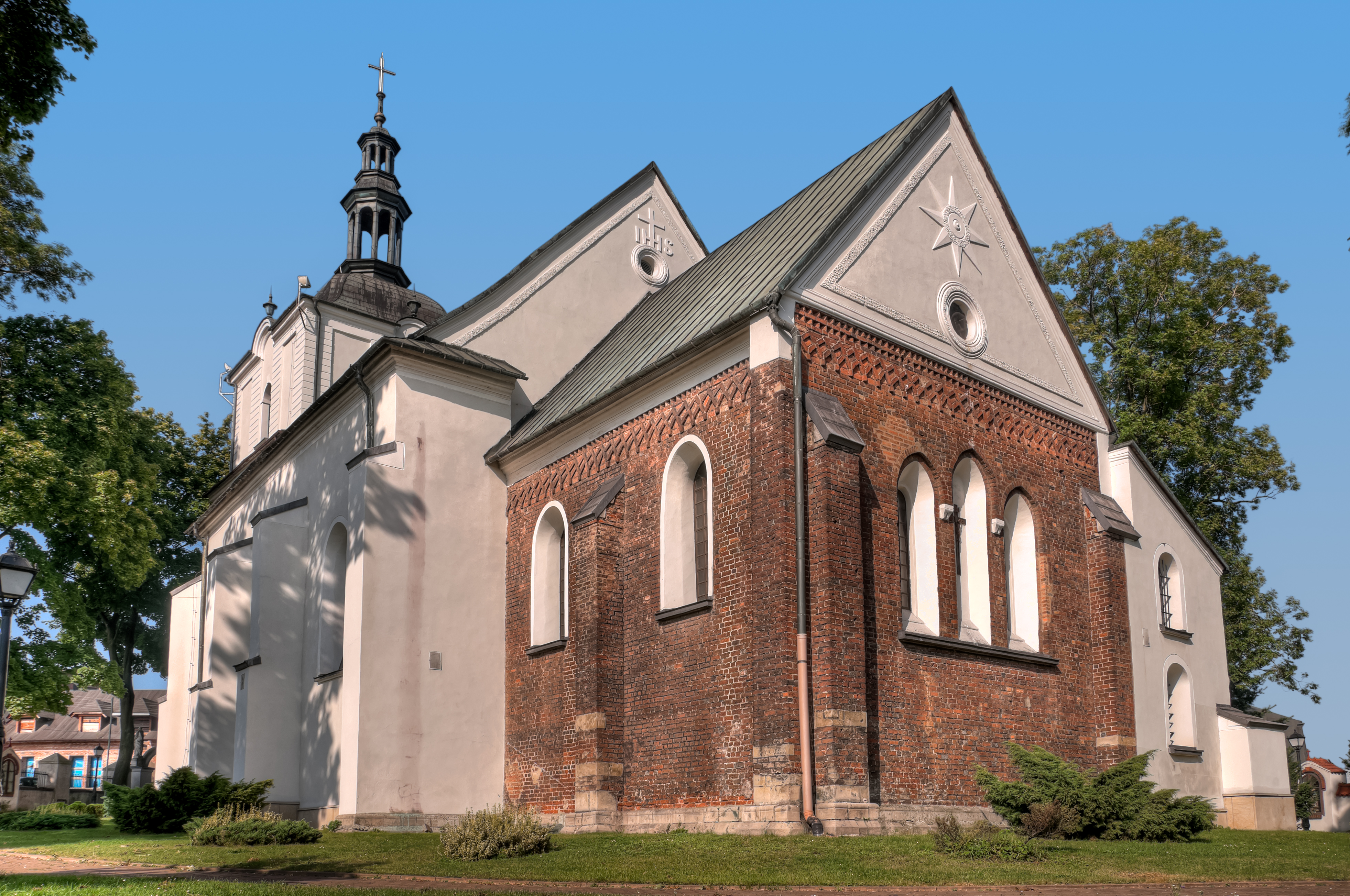 Kościół parafialny p. w. Podwyższenia Krzyża i świętego Mikołaja z ok. 1250 r, Sławków